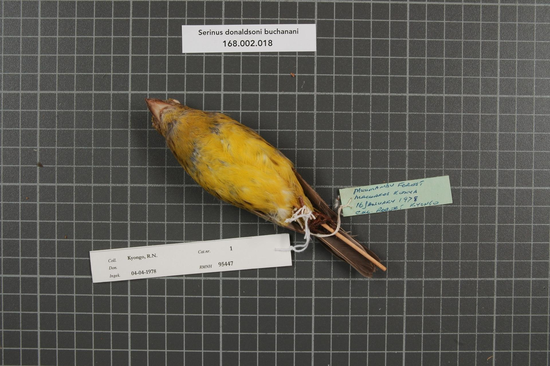 Serinus donaldsoni buchanani Hartert, 1919